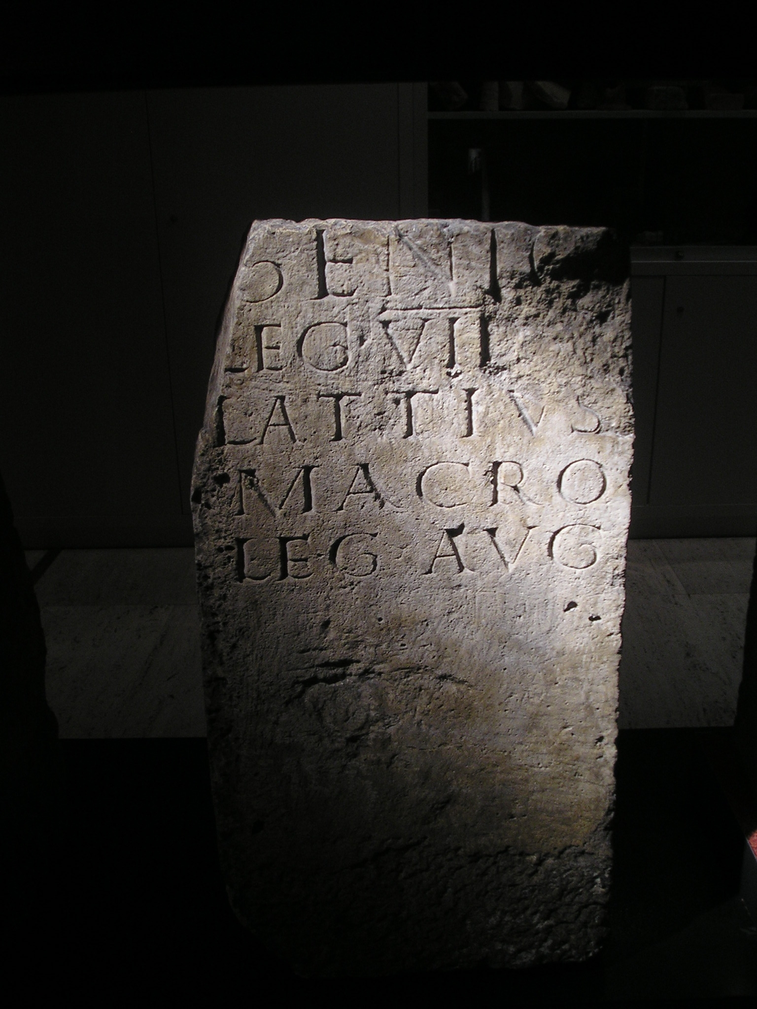 Ara votiva de León (Museo de León) dedicada al Genius de la Legio VII Gemina dedica por su legado L. Attius Macro hacia 123, correspondiente a la inscripción CIL II 5083, que dice GENIO/ LEG(ionis) VII [G(eminae) F(elicis)]/ L(ucius) ATTIVS/ MACRO/ LEG(atus) AVG(usti).